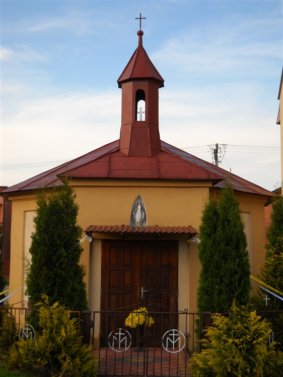 Kapliczka z przed 1862 r. w Woli Raniżowskiej